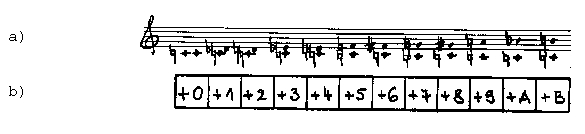 Intervallide tähistamine arvudega. Plussmärk arvu ees tähistab liikumist põhiheli (näites C) suhtes üles. Miinusmärk tähistab liikumist alla.